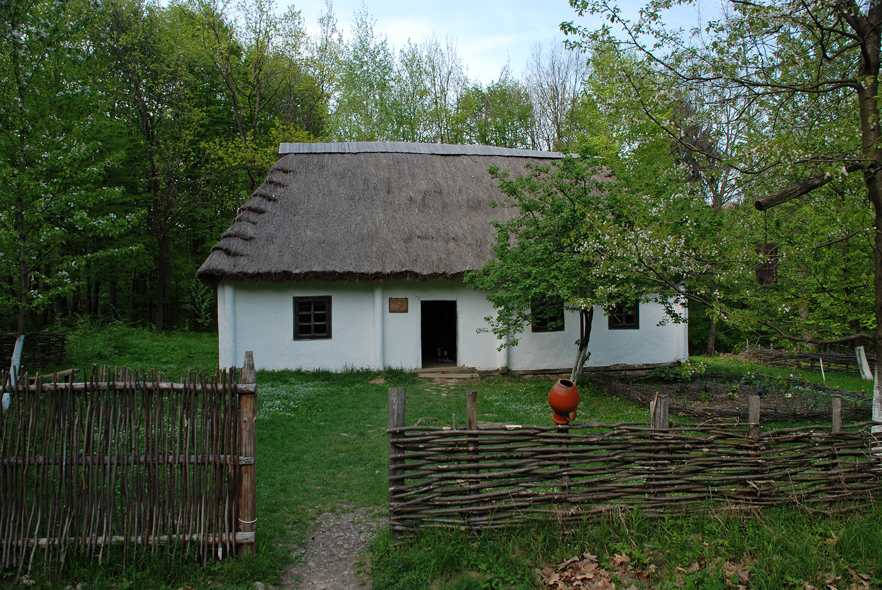 Будинок житловий з Покуття, Крилос, ур. Прокаліїв Сад